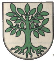 Wappen von Fey Kanton Waadt Schweiz